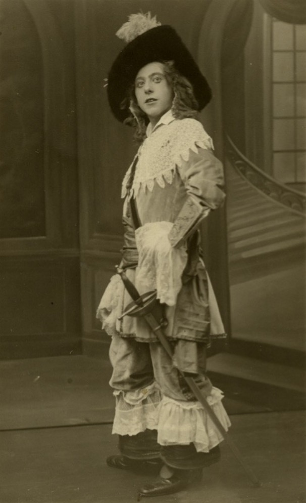 Florent Van den Berghe in de rol van Musketier in het Vlaamsch Tooneel Van den Berghe